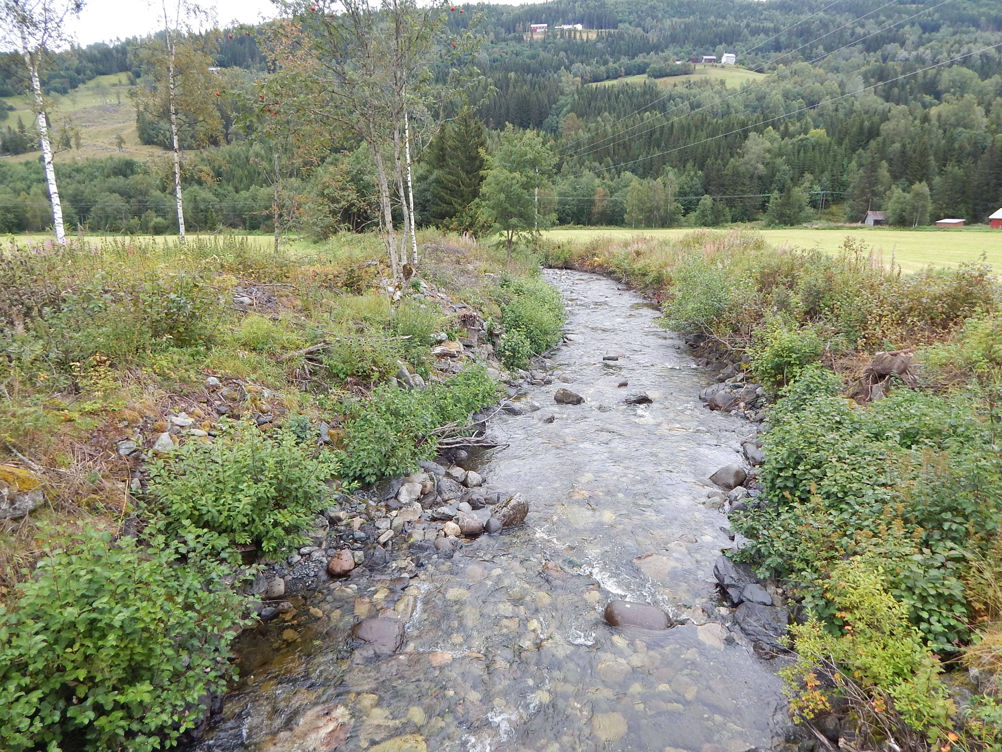 Augga nedstrøms fra Ånrudbrua